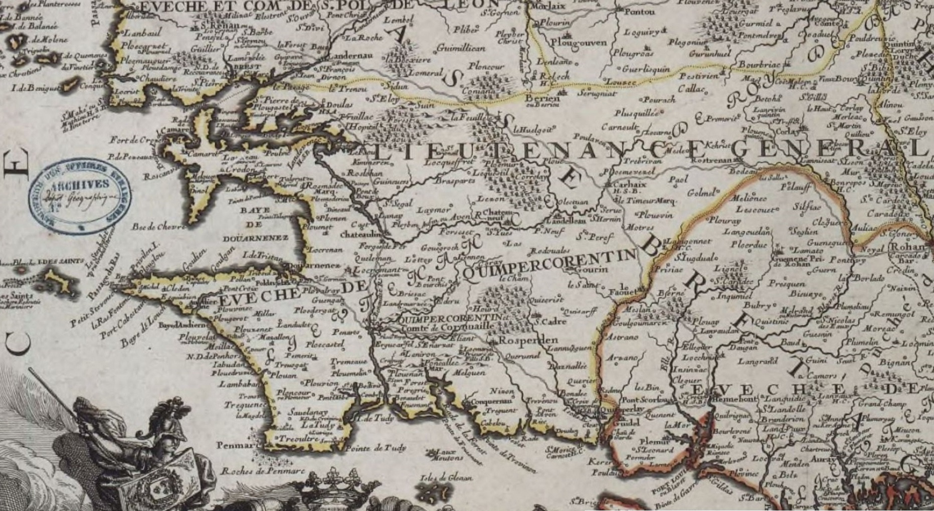 carte du diocèse de Quimper ( carte du duché de Bretagne de Jean-Baptiste Nolin publiée en 1695) avec le nom des paroisses.